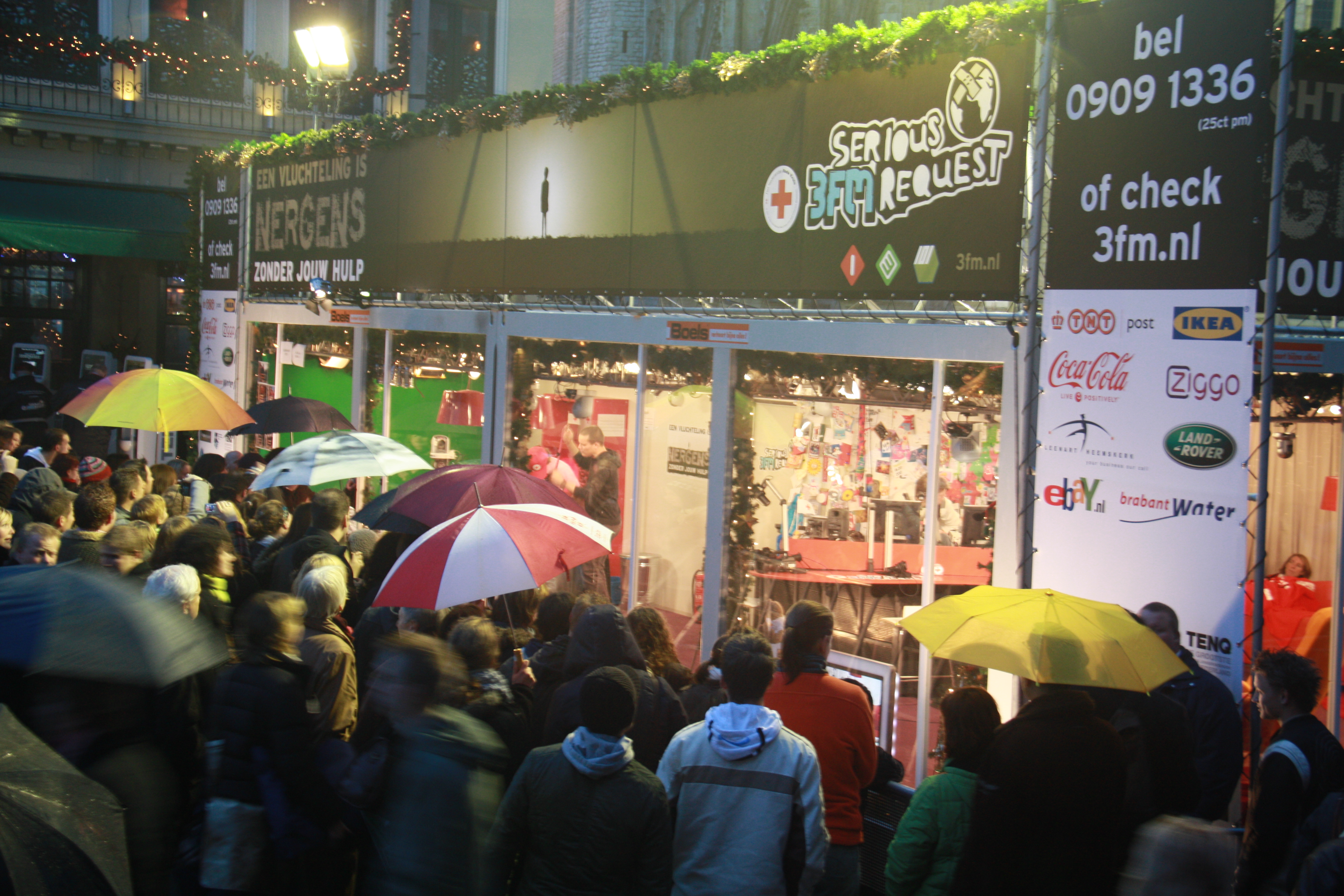 Het glazen huis van de Serious Request van 2008 te Breda